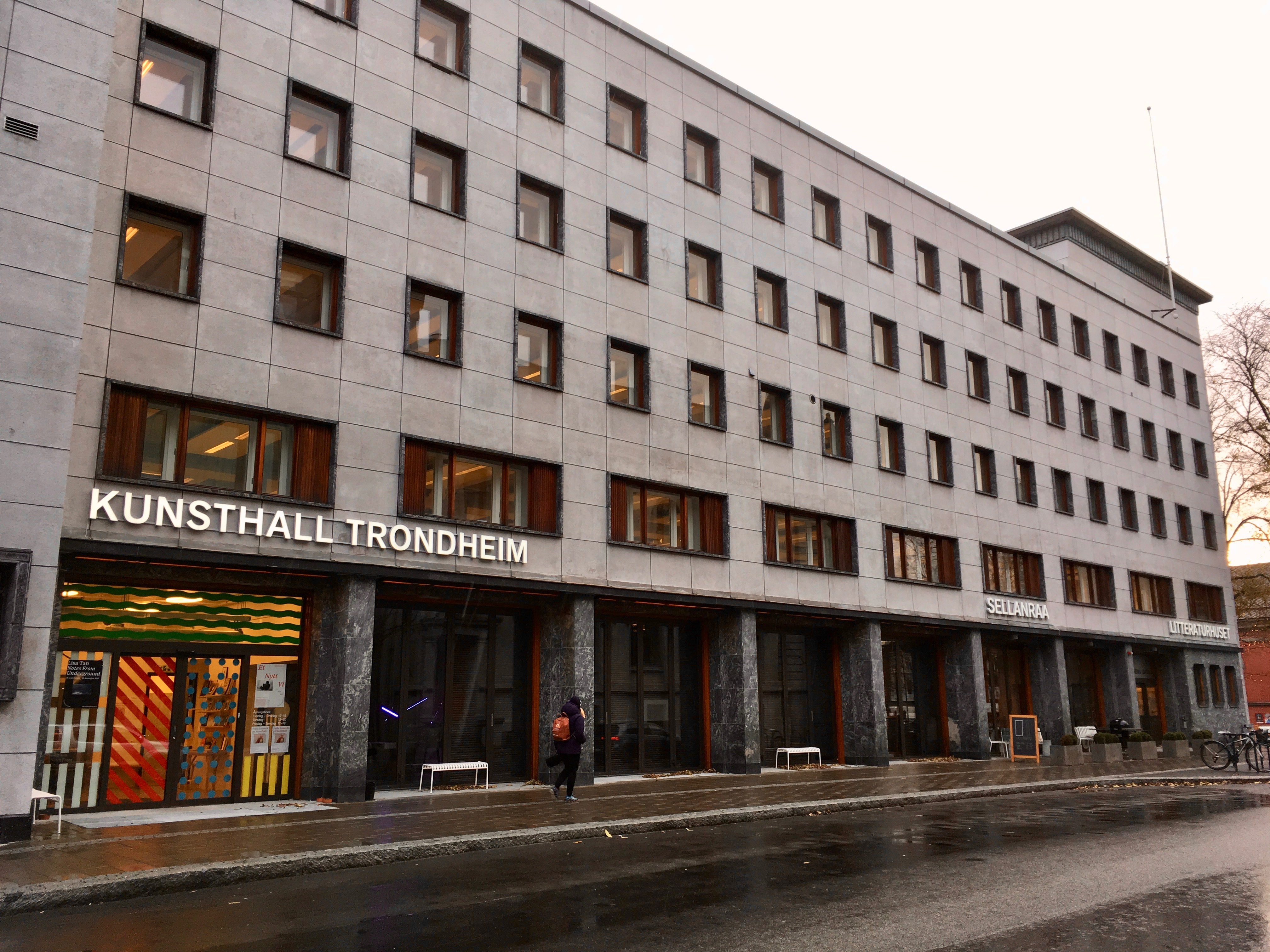 Kunsthall Trondheim ligger i byens gamle hovedbrannstasjon i Kongens gate, med inngang fra Søndre gate. Åpnet i 2016